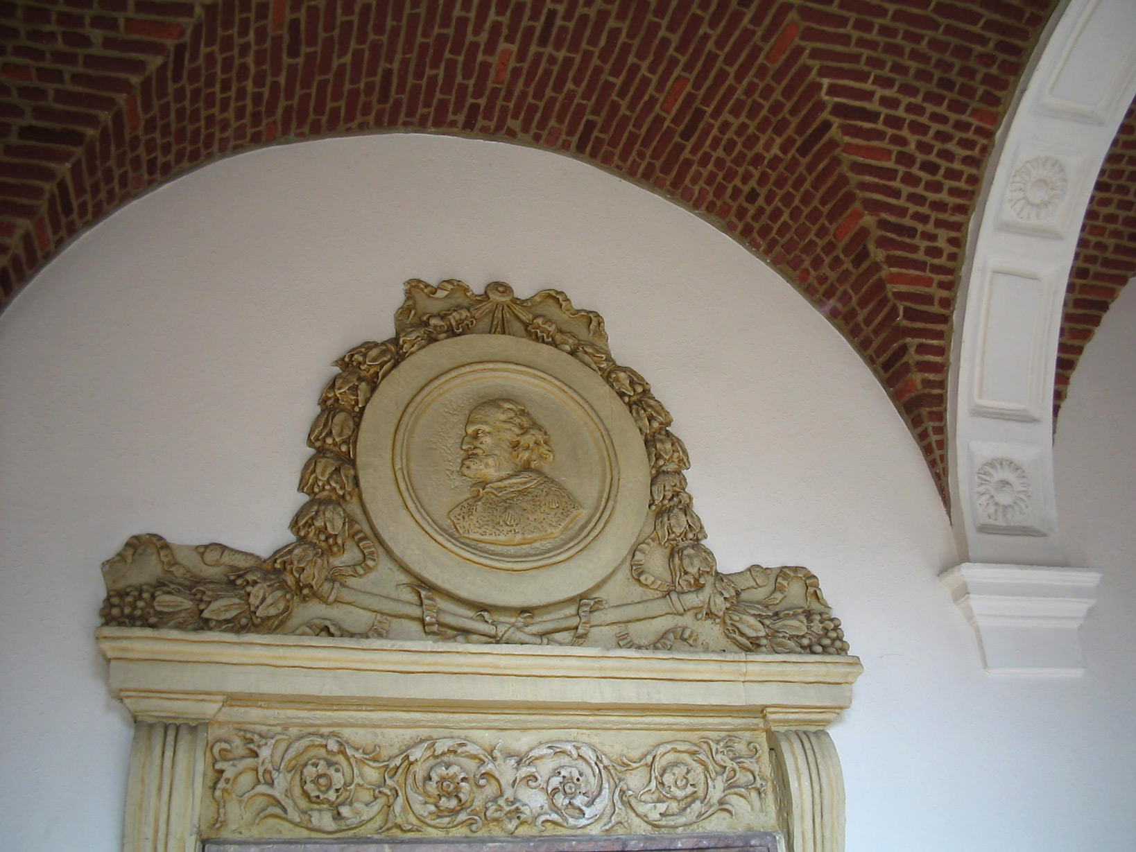 Médaillon sculpté dans le grand cloître de la Chartreuse de Liège. Ce médaillon surmonte la porte d'une des cellules des moines. Le personnage représente sans doute St Jacques, car on distingue des coquilles sur son vêtement. Le cloître fut rénové vers le milieu du XVIIe siècle par le prieur Gilles de Liverlo (Stiennon 1990).